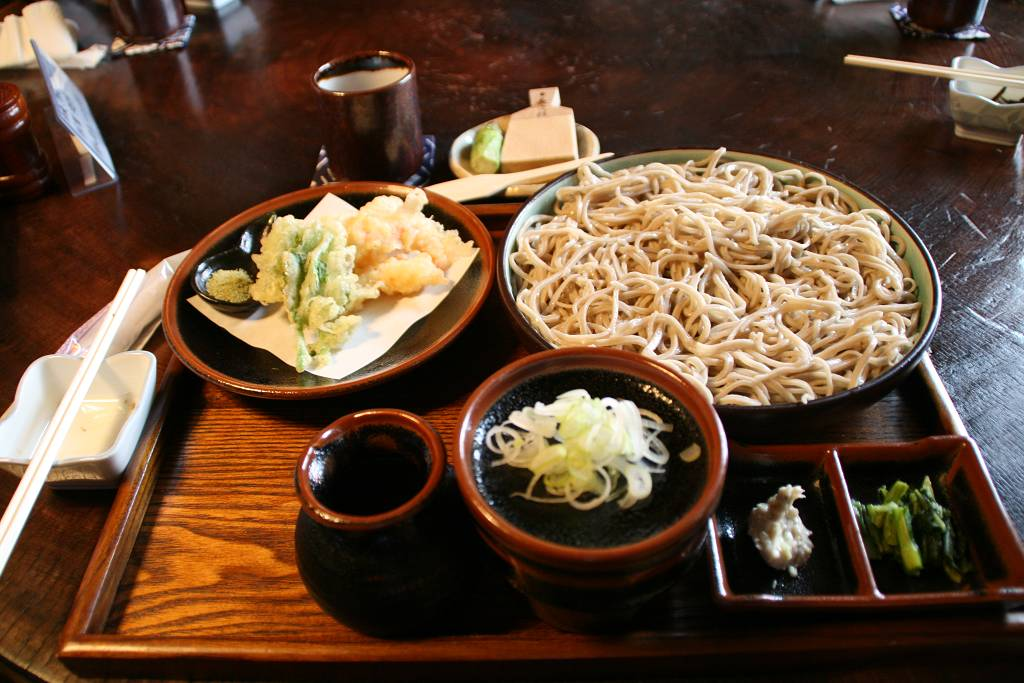 Soba noodles